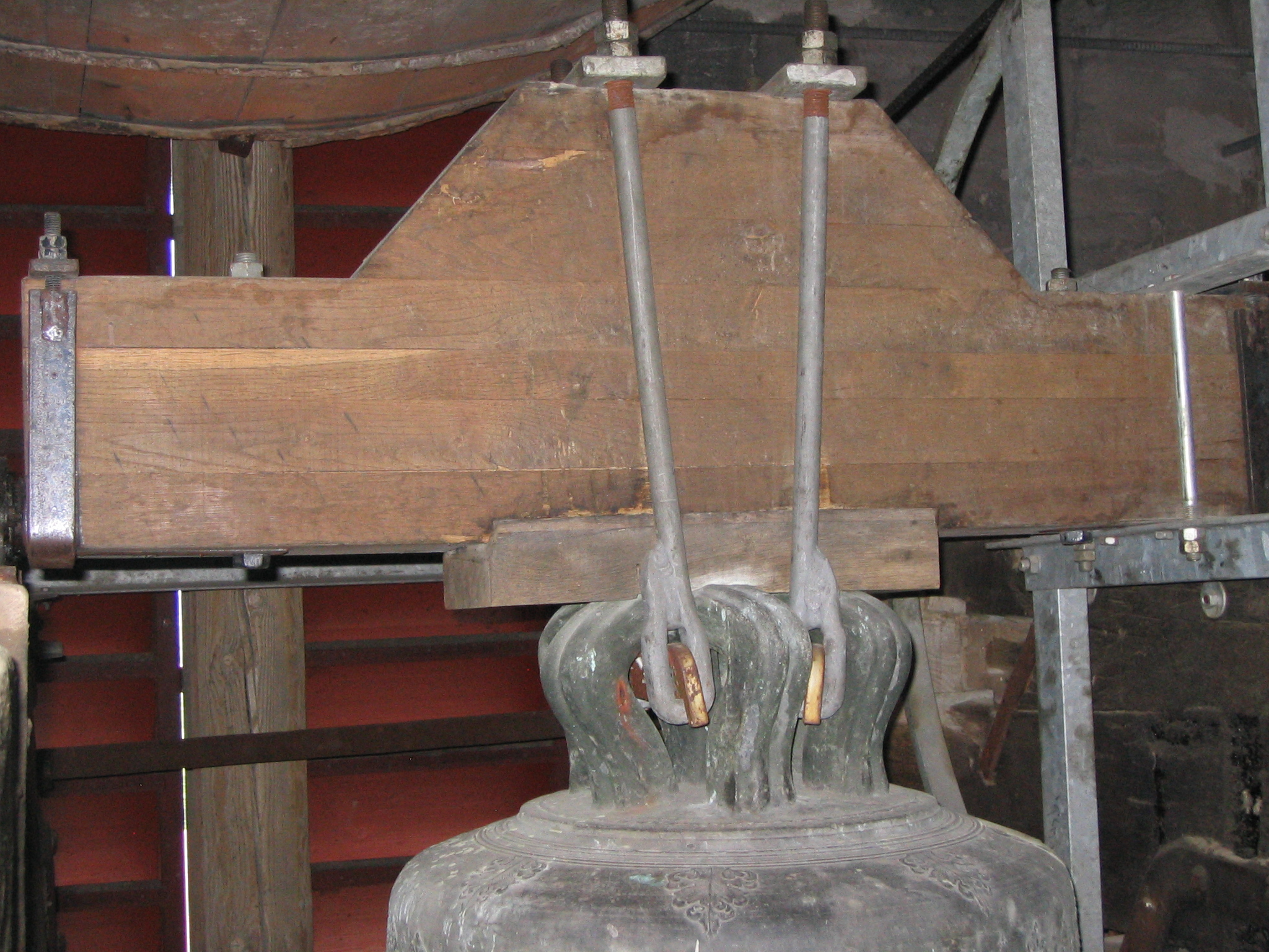 Glockenjoch im Münster St. Georg zu Dinkelsbühl